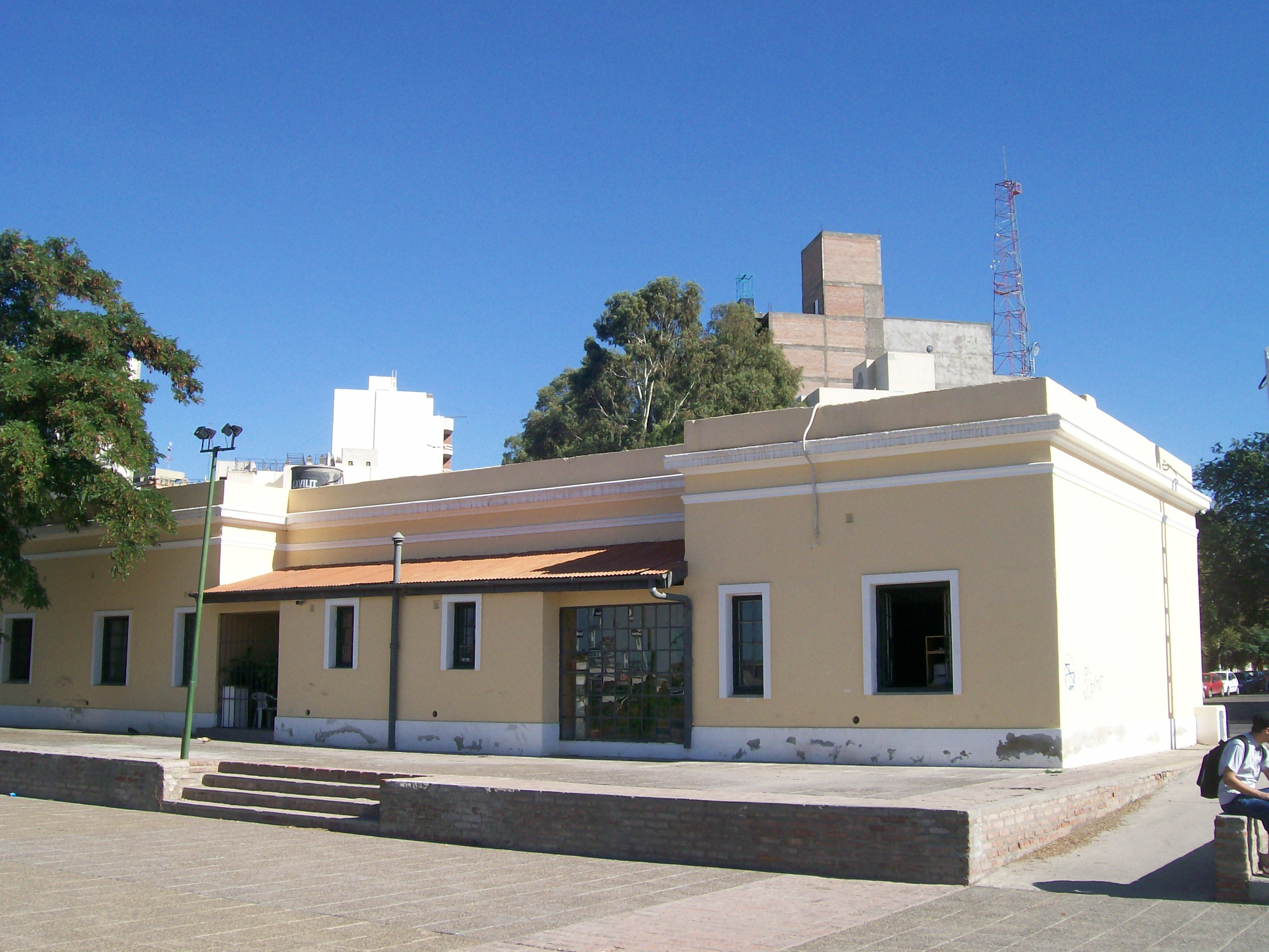 Museo de la Ciudad de Neuquen